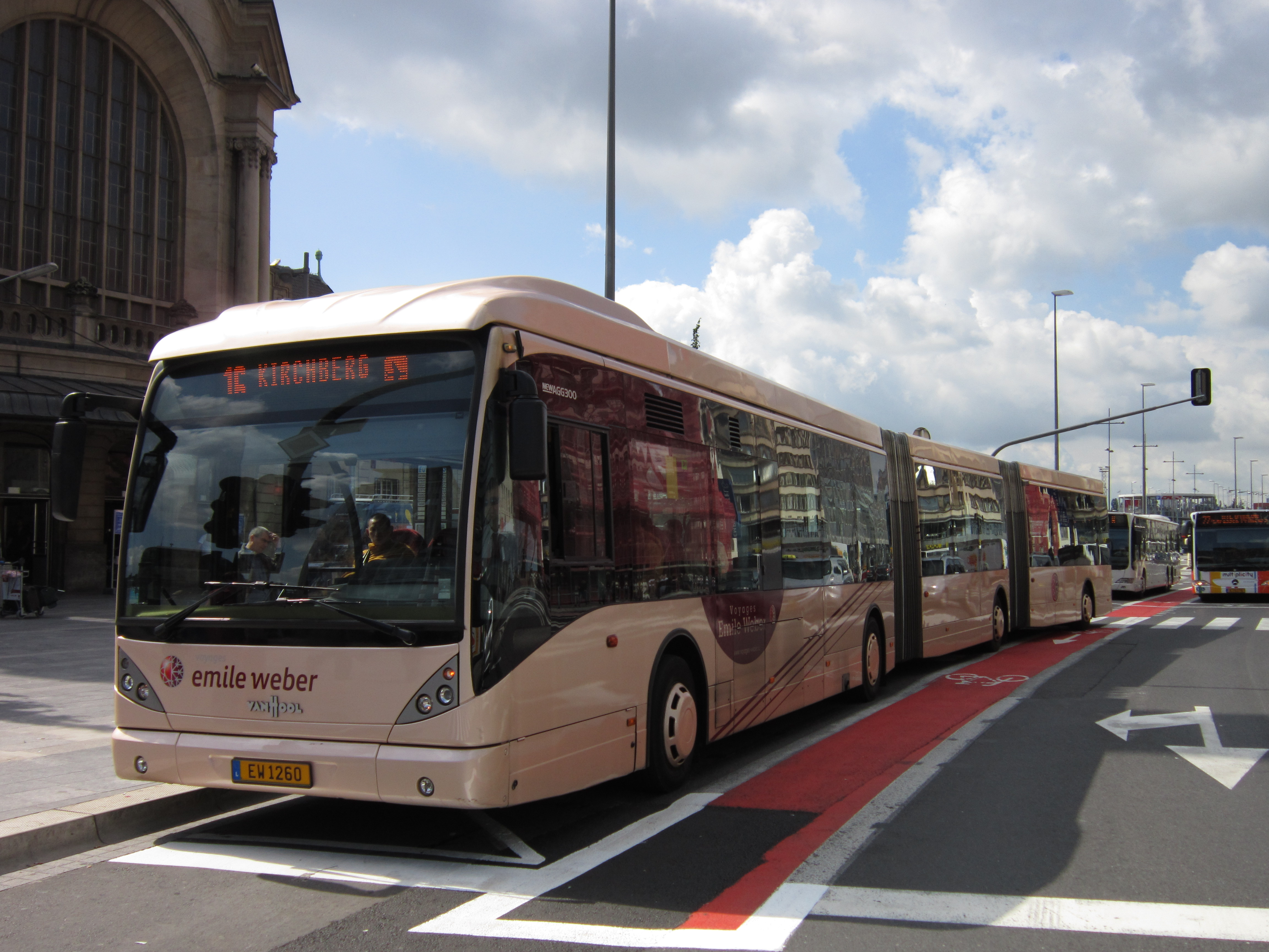 Van Hool New AGG 300 privé à Luxembourg.